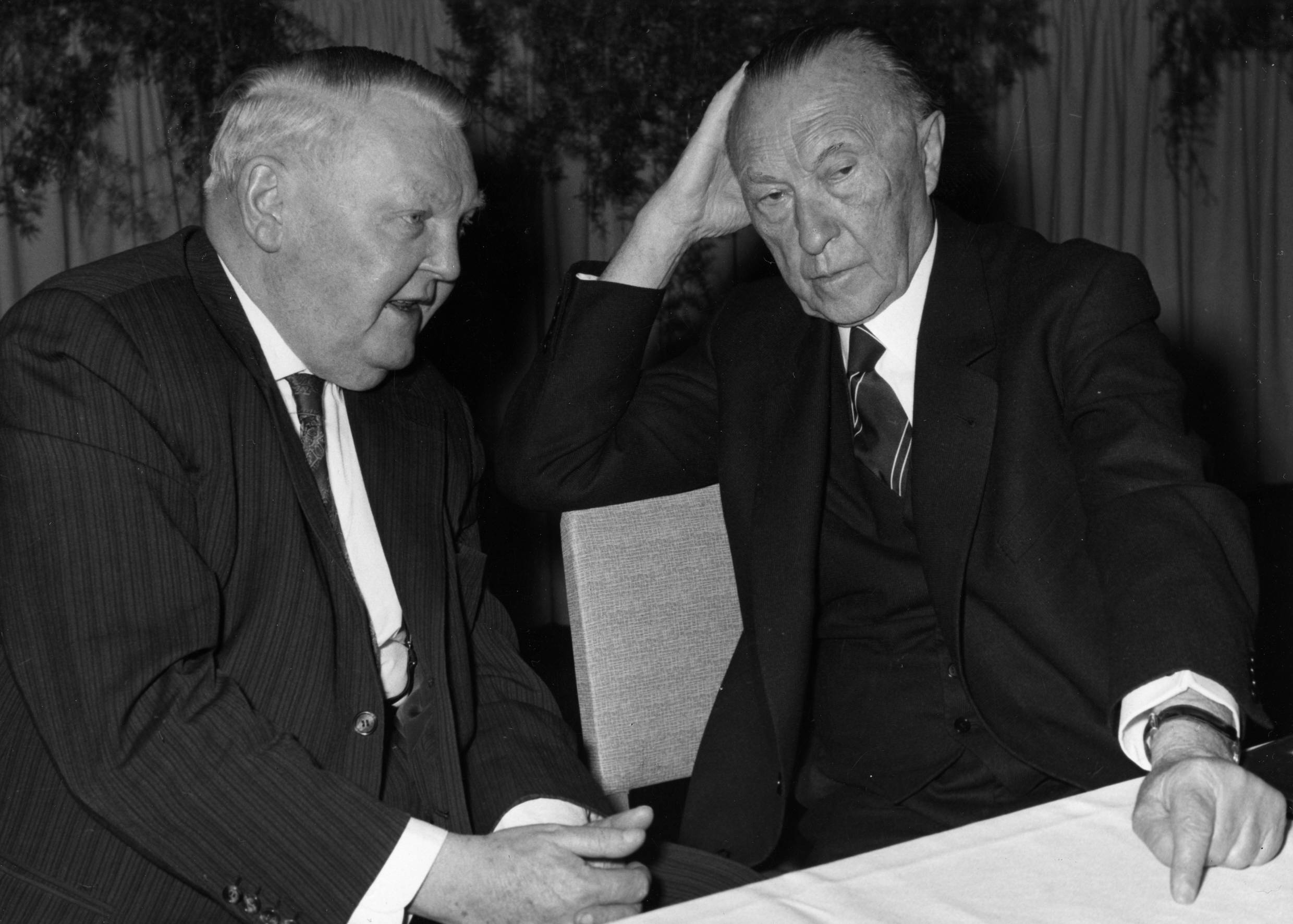 Adenauer, Konrad (rechts), Erhard, Ludwig (links)10. CDU-Bundesparteitag, 24.04.1961 - 27.04.1961